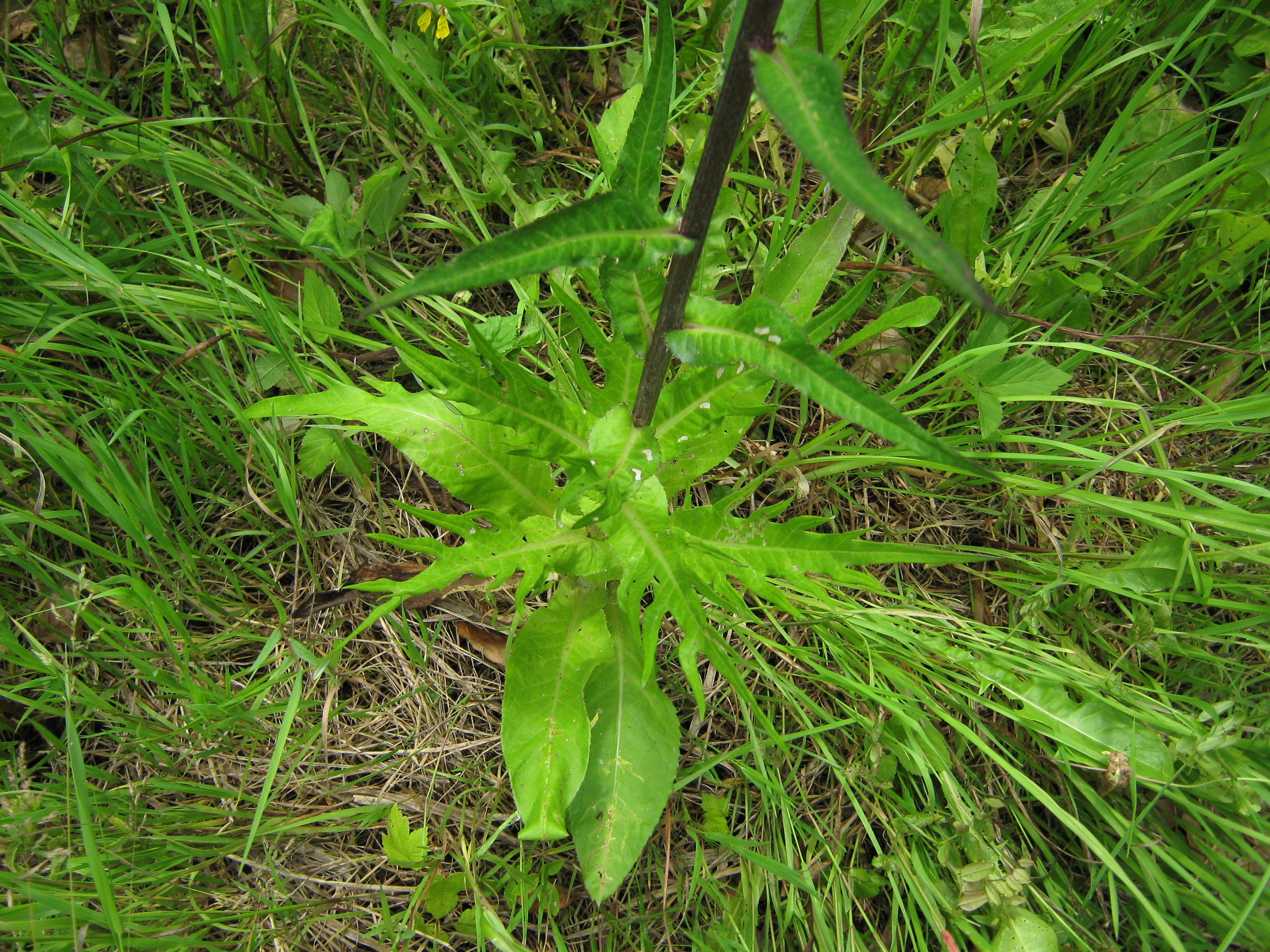 Verschiedenblättrige Kratzdistel, verschiedene Blattformen